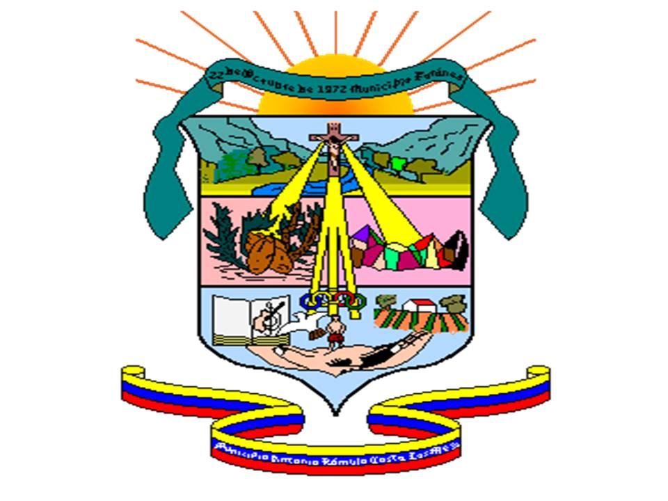 escudo municipio antonio romulo costa